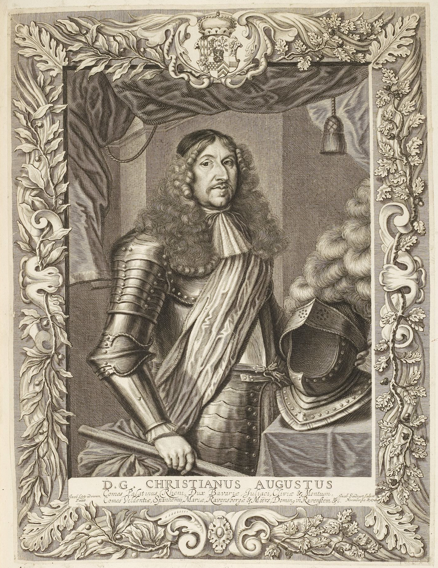 Grafik aus dem Klebeband Nr. 1 der Fürstlich Waldeckschen Hofbibliothek Arolsen Motiv: Christian August von Pfalz-Sulzbach